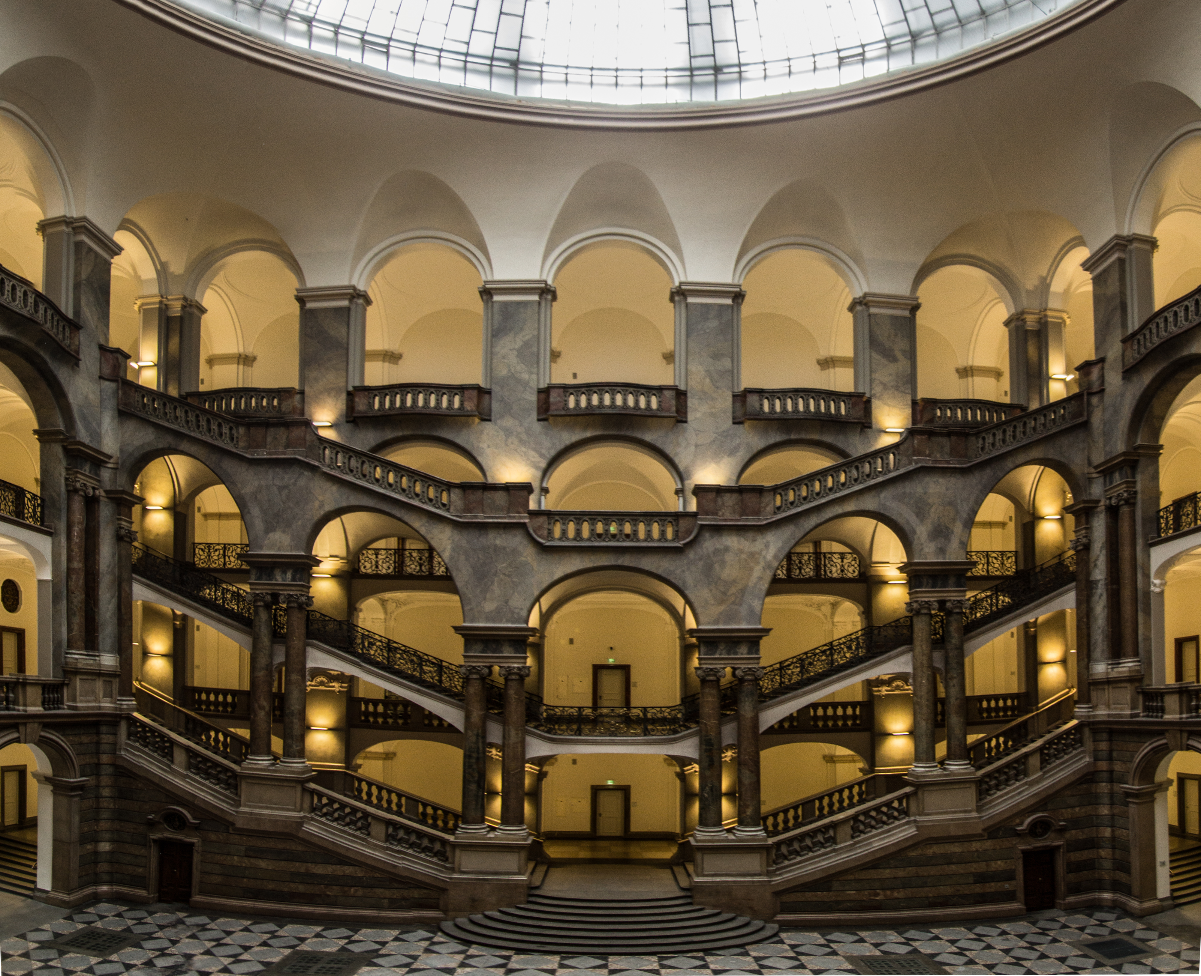 Palacio de Justicia de Munich. Interior